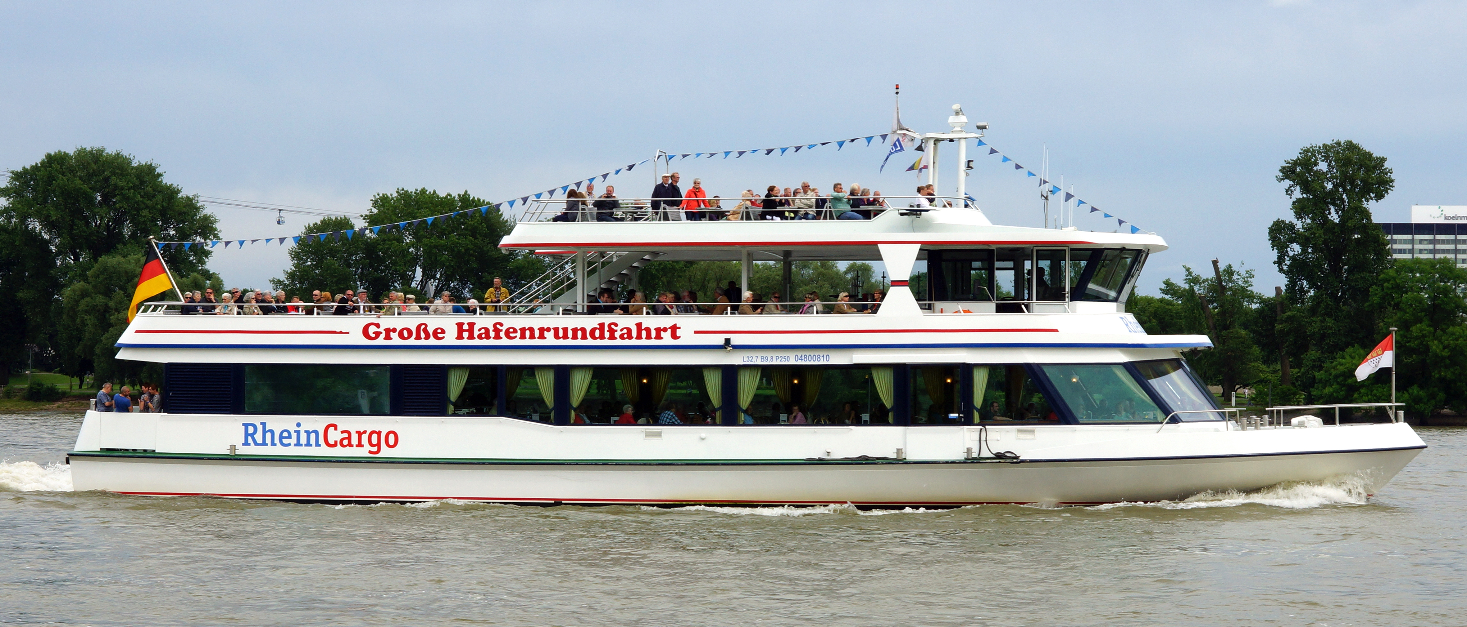 Hafenrundfahrtschiff RheinCargo auf Fahrt in Köln.